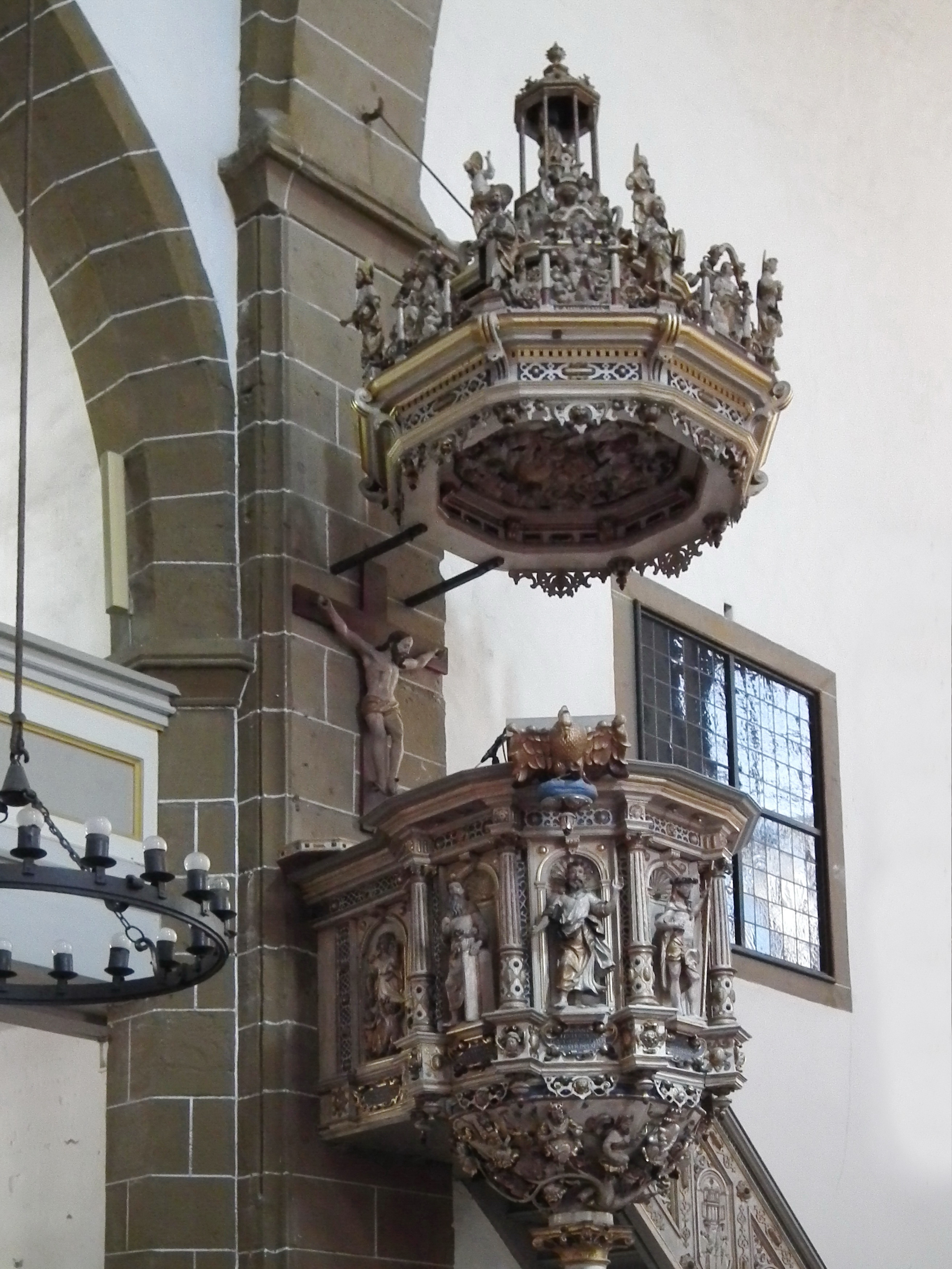 Kaufmannskirche Native nameKaufmannskircheLocationErfurt, GermanyCoordinates50° 58′ 40.64″ N, 11° 02′ 06.48″ E